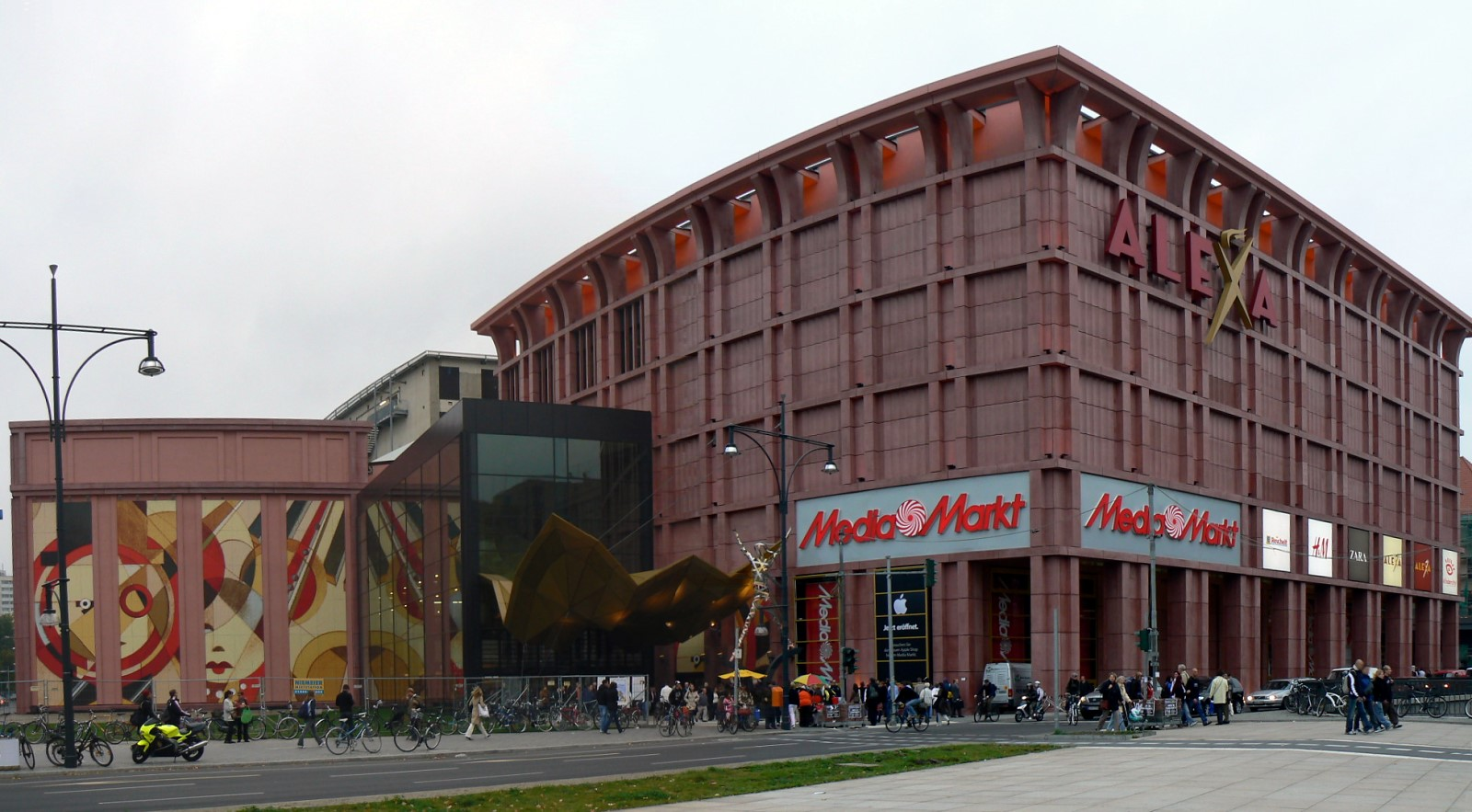 Eingangsbereich des Einkaufszentrums Alexa am Alexanderplatz in Berlin. (Panorama aus zwei Fotos)